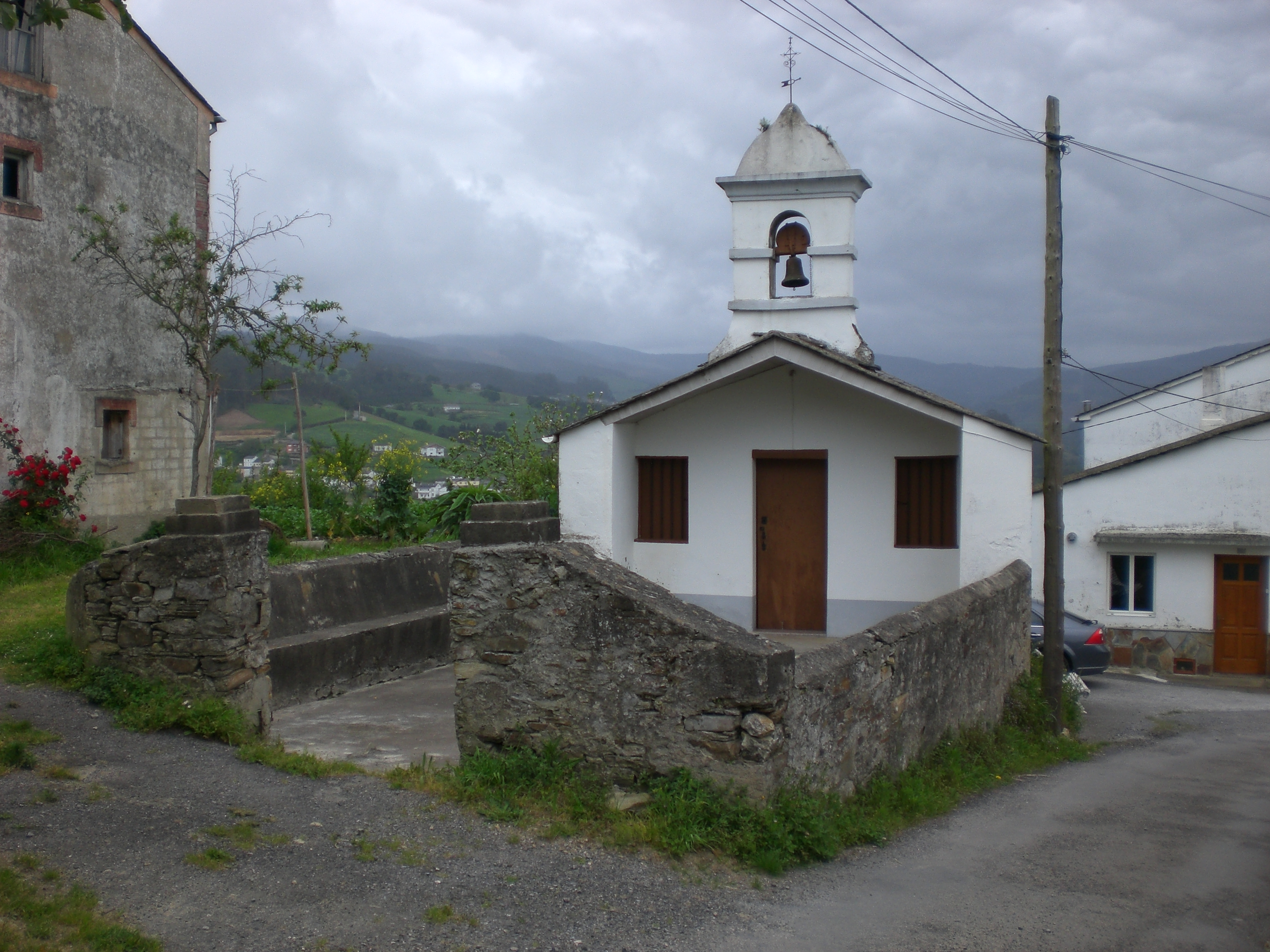 Capilla de Miou (Asturias).